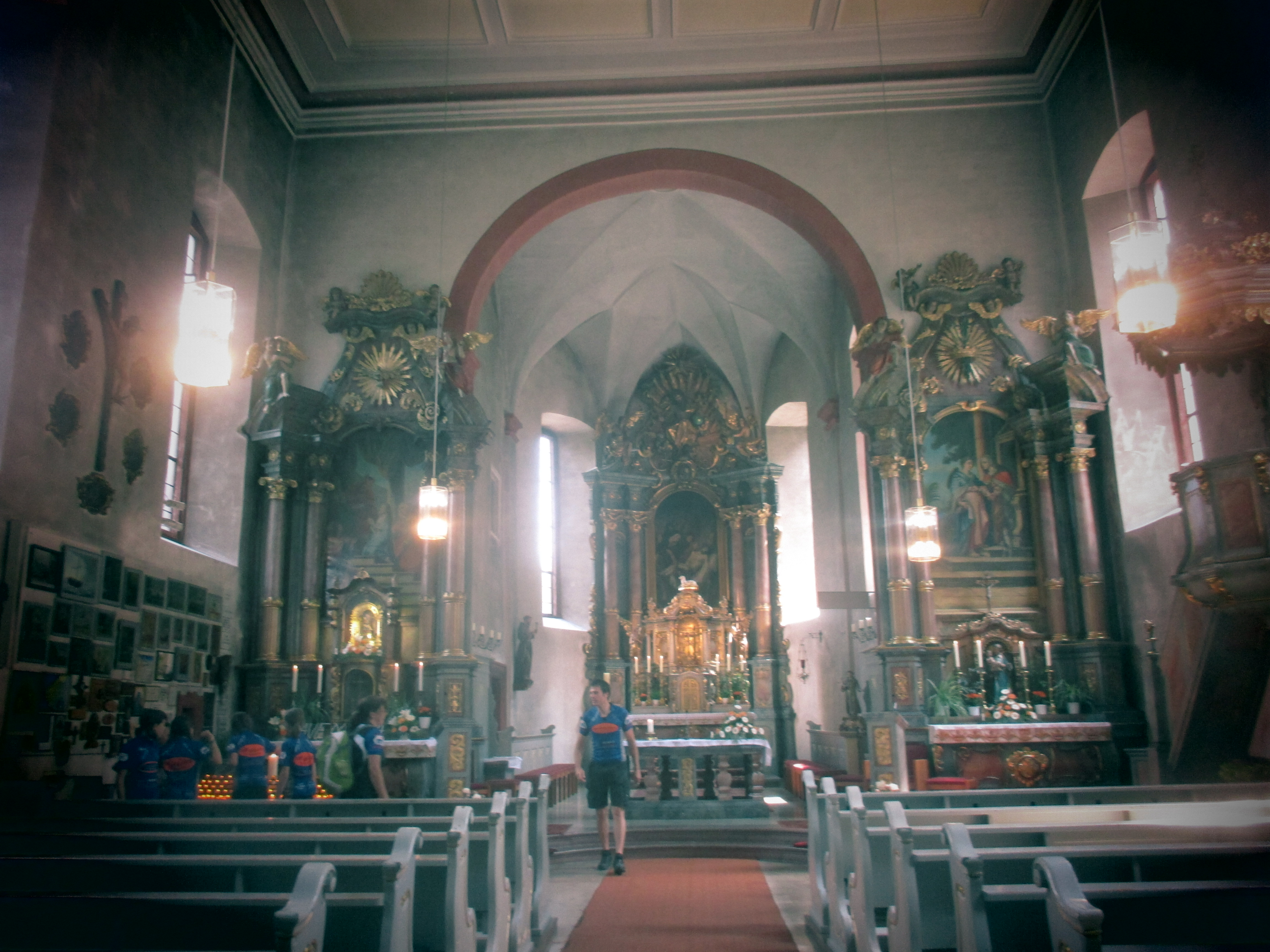 Inneres der Wallfahrtskirche